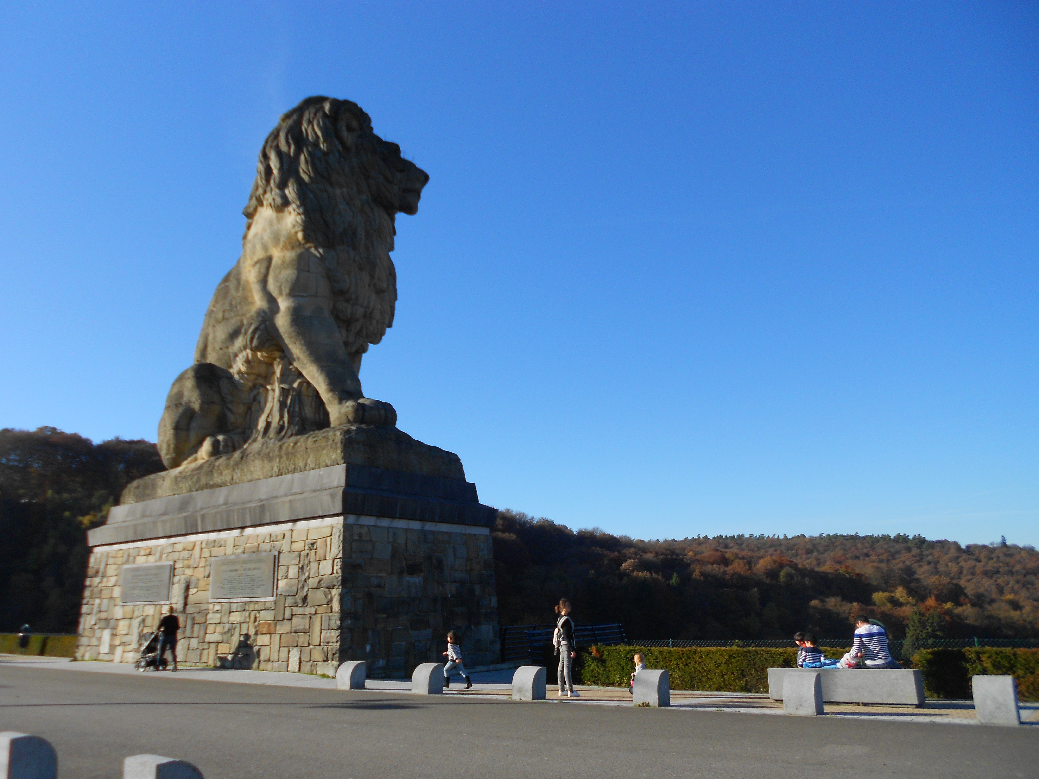 De leeuw (een beeld van Antoine-Félix Bouré) van de Gileppestuwdam.